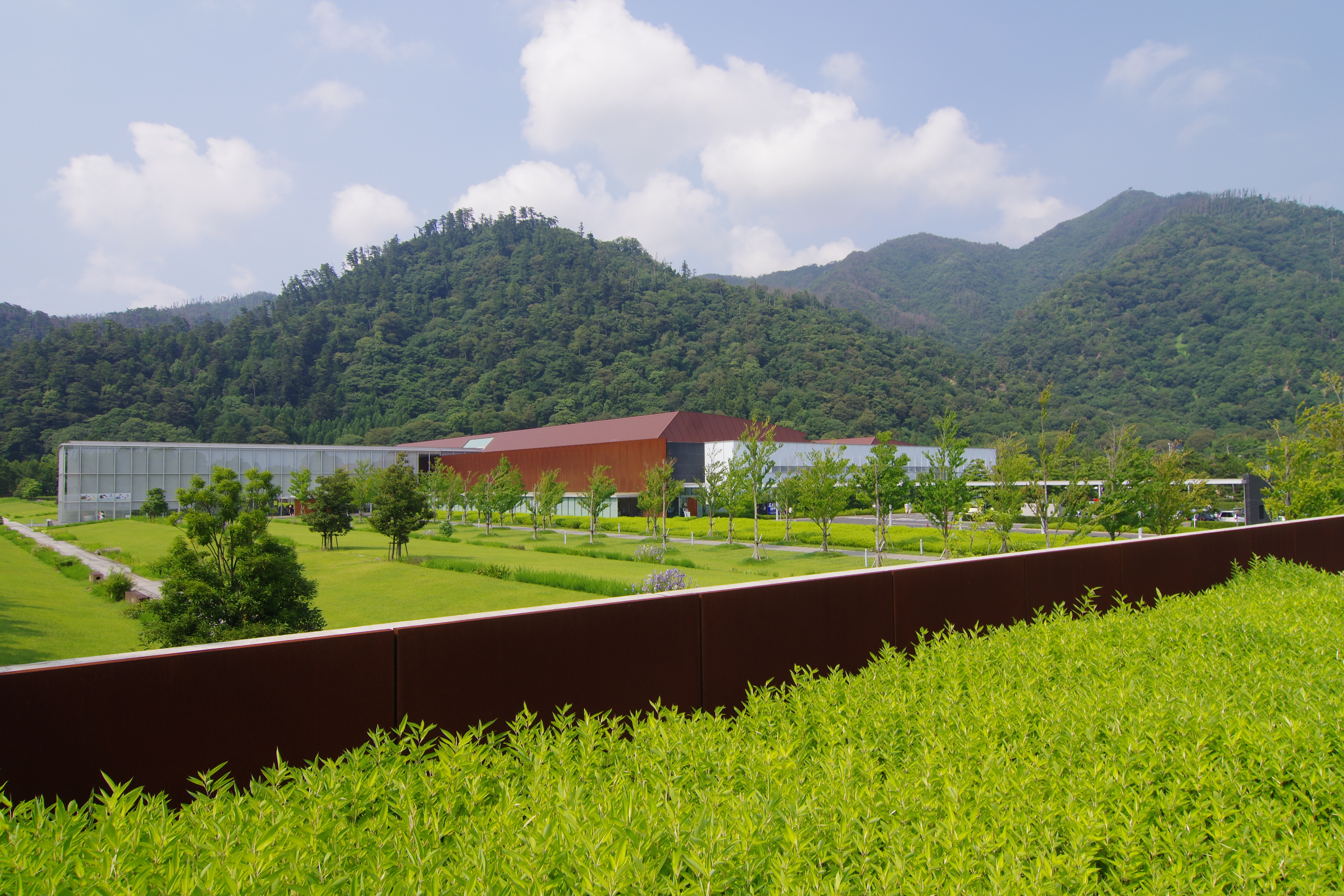 島根県出雲市大社町にある島根県立古代出雲歴史博物館外観